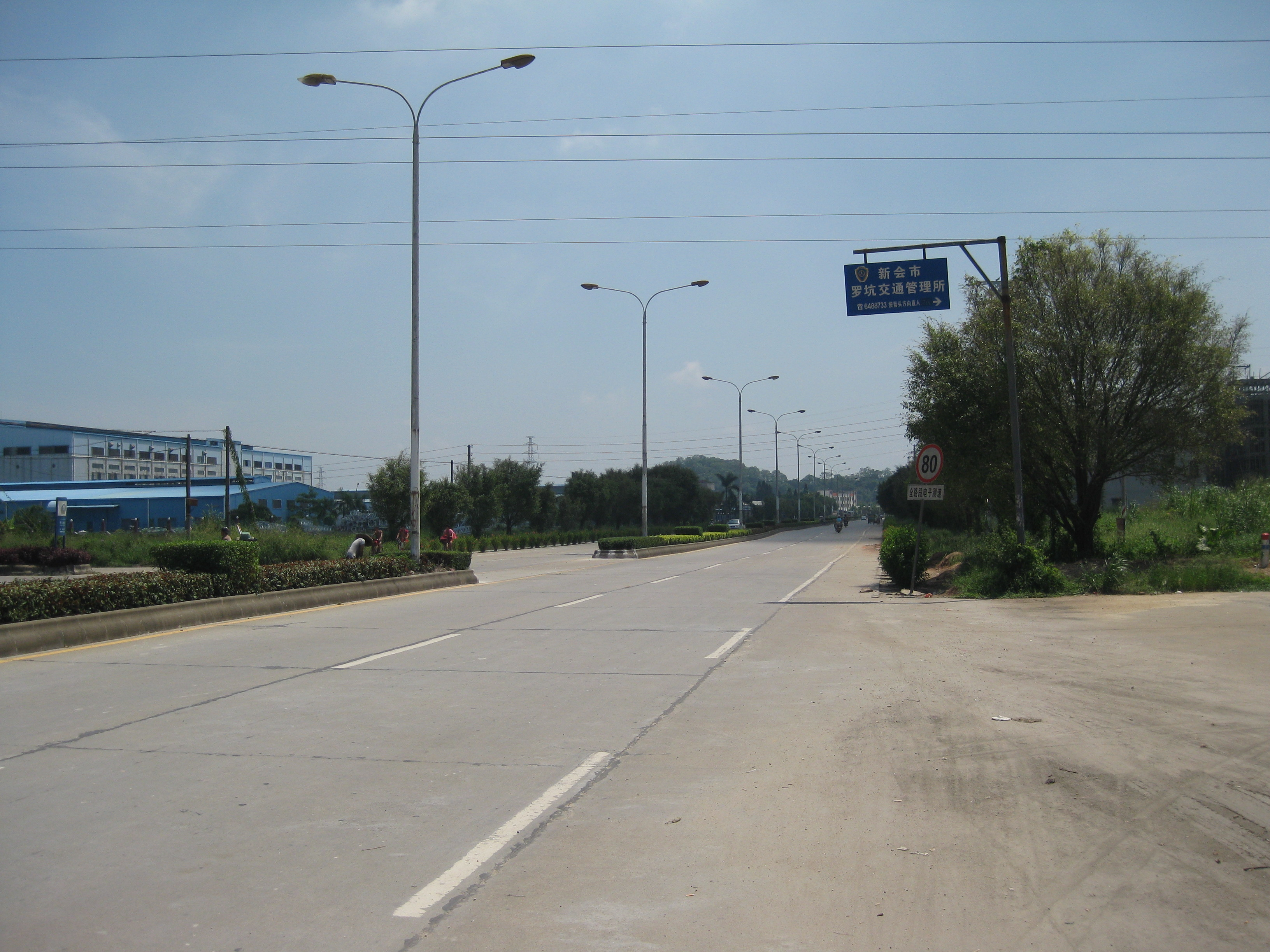 小罗公路罗坑段